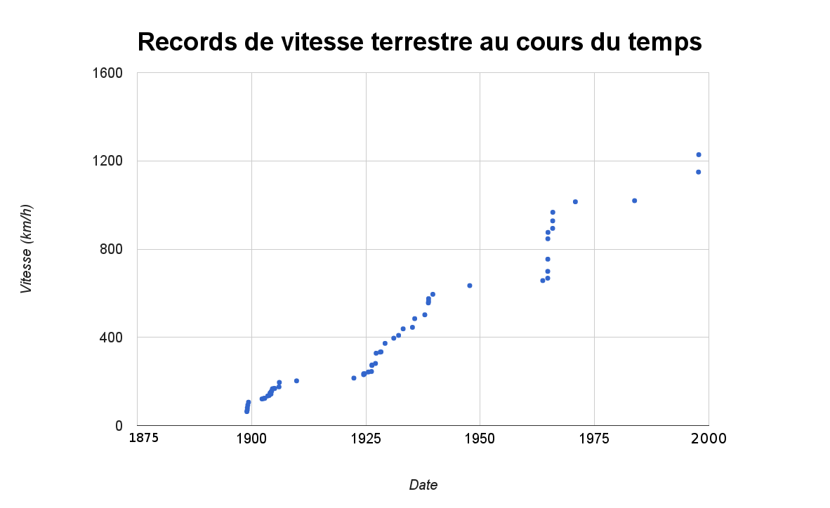 Évolution du record absolu de vitesse terrestre depuis la fin du XIXème siècle, en km/h